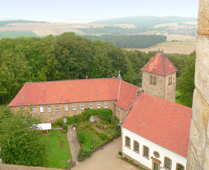 Blick vom Bergfried Burg Wohldenberg hinunter auf Eingang mit Torhaus und Kirche